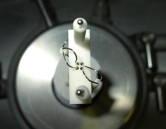 DTA-Probenträger aus Aluminiumoxid (Draufsicht) mit Thermoelementen